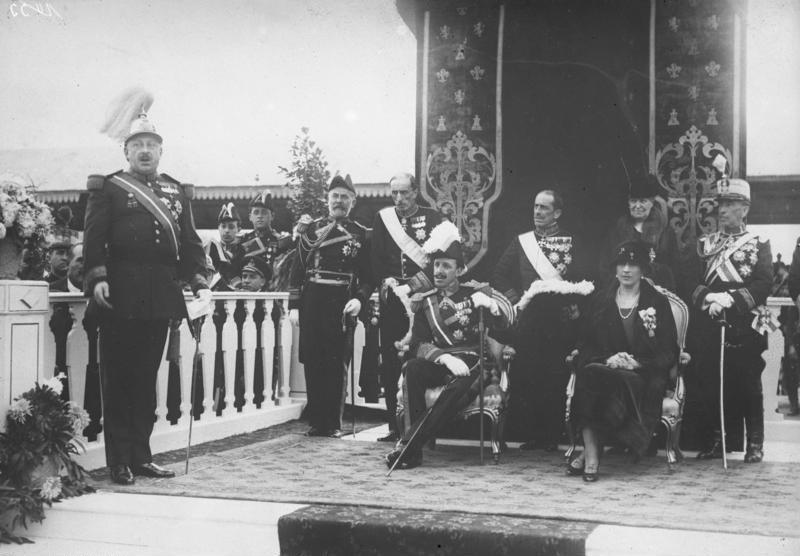 Zur Abdankung des Königs von Spanien! Der König und die Königin von Spanien mit Mitgliedern ihres Hofes, welche alle das Land verlassen haben.